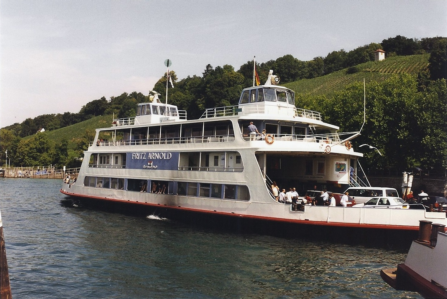 Das auslaufende Fährschiff Fritz Arnold vor den Weinbergen von Meersburg